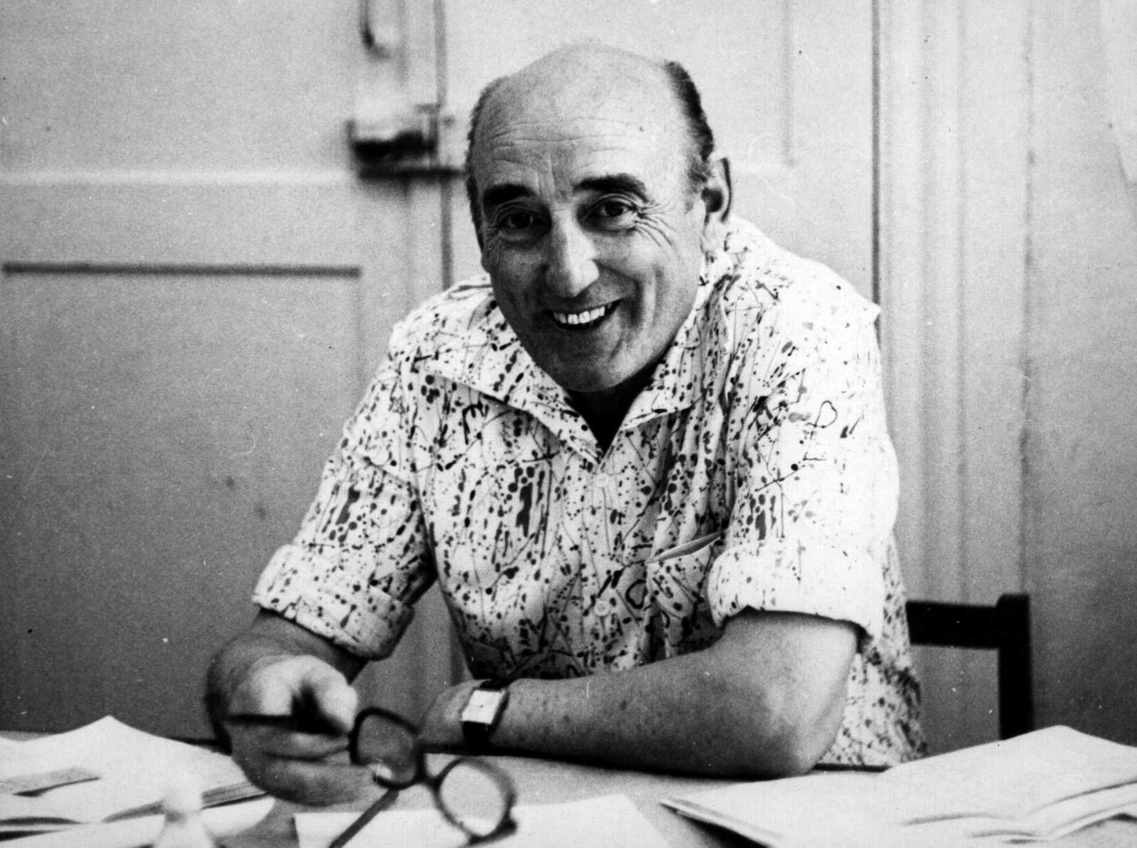 За работой в Институте Географии КазССР